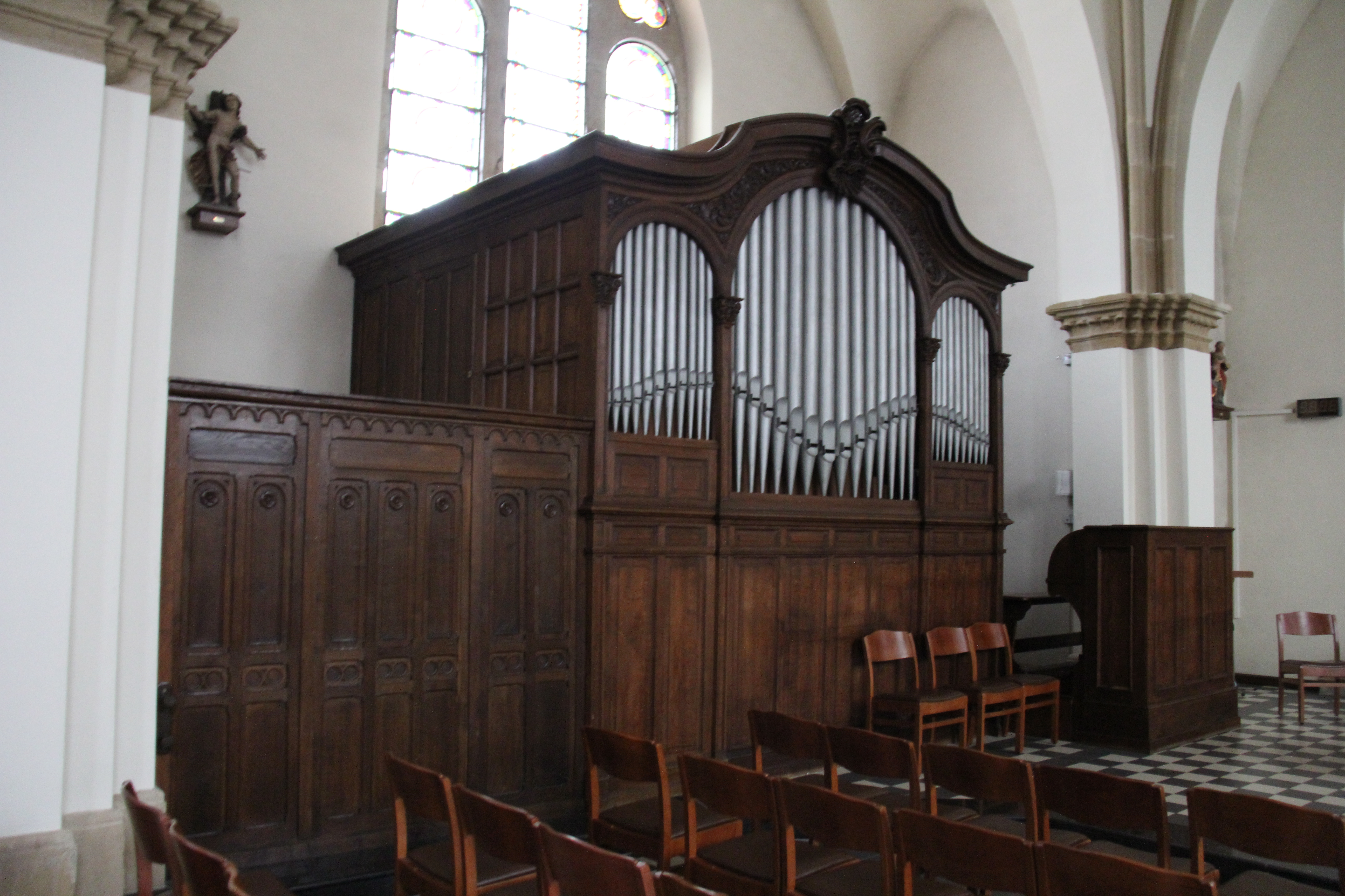 D'Uergel an der Parkierch vu Biekerech. Se gouf 1931 vum Georges Haupt vu Lëntgen gebaut.